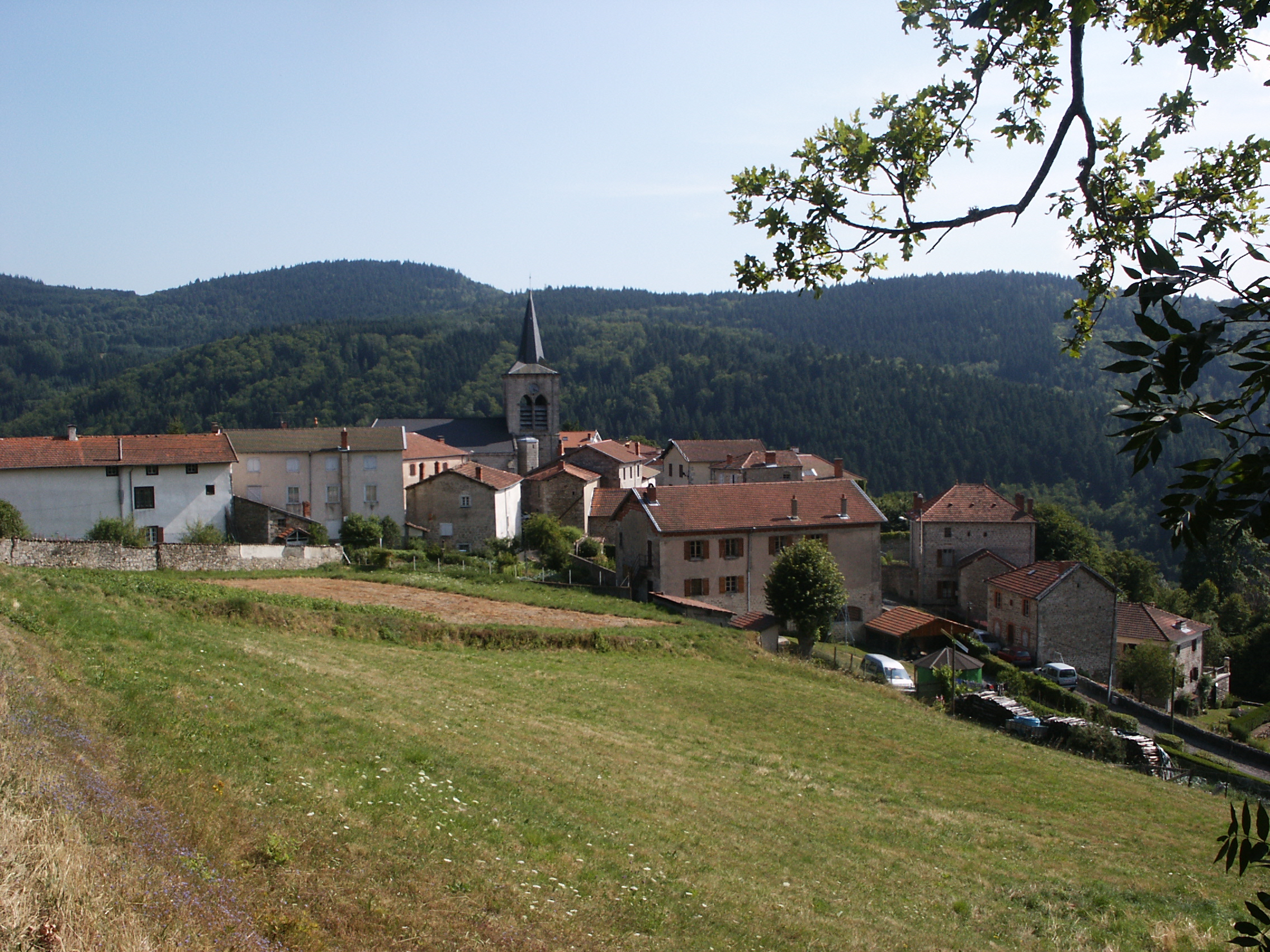 le village de Valcivières